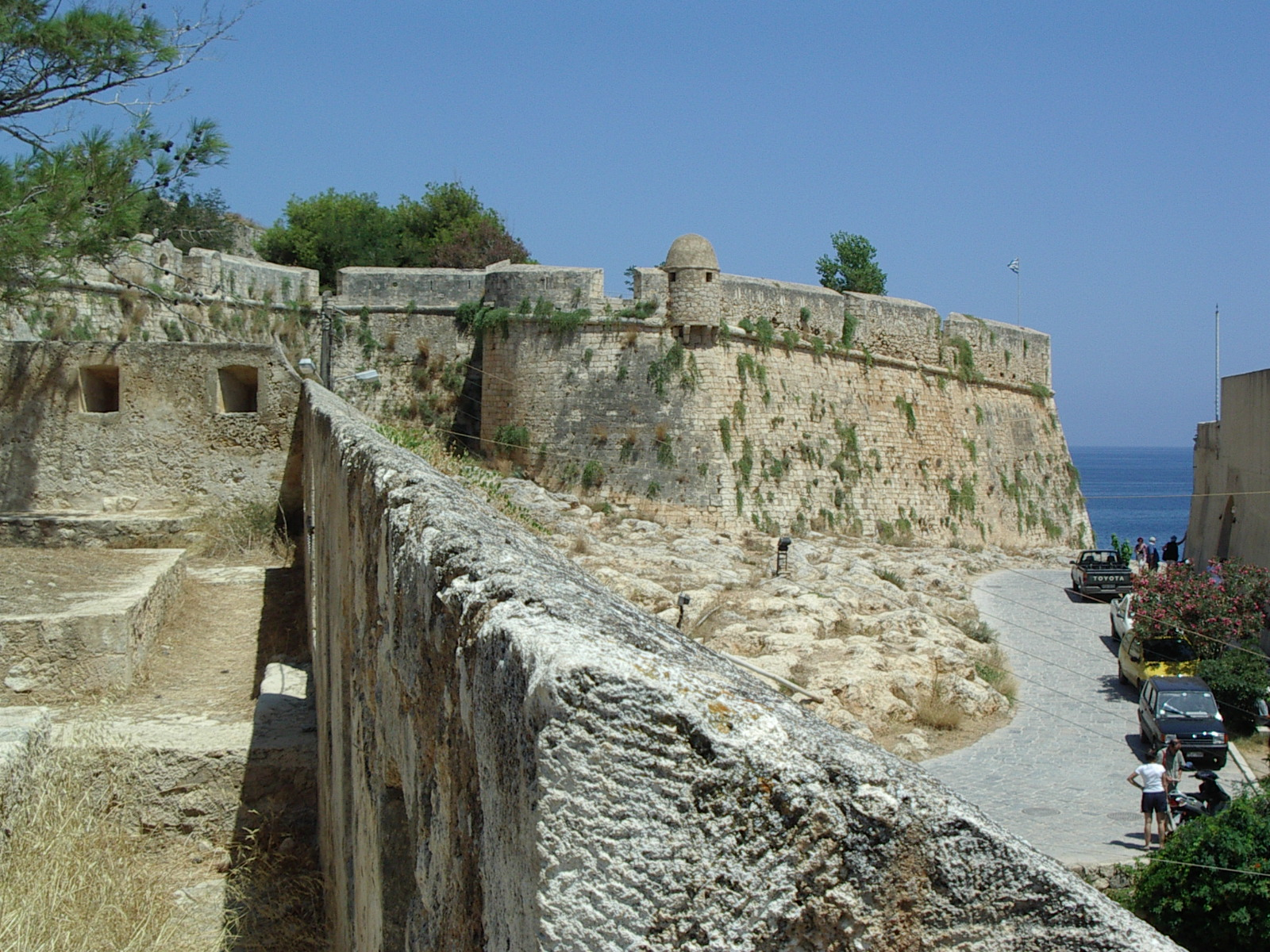 Forteresse vénitienne à Réthymnon Source: photo perso Rémi Stosskopf Date: 29 july 2004